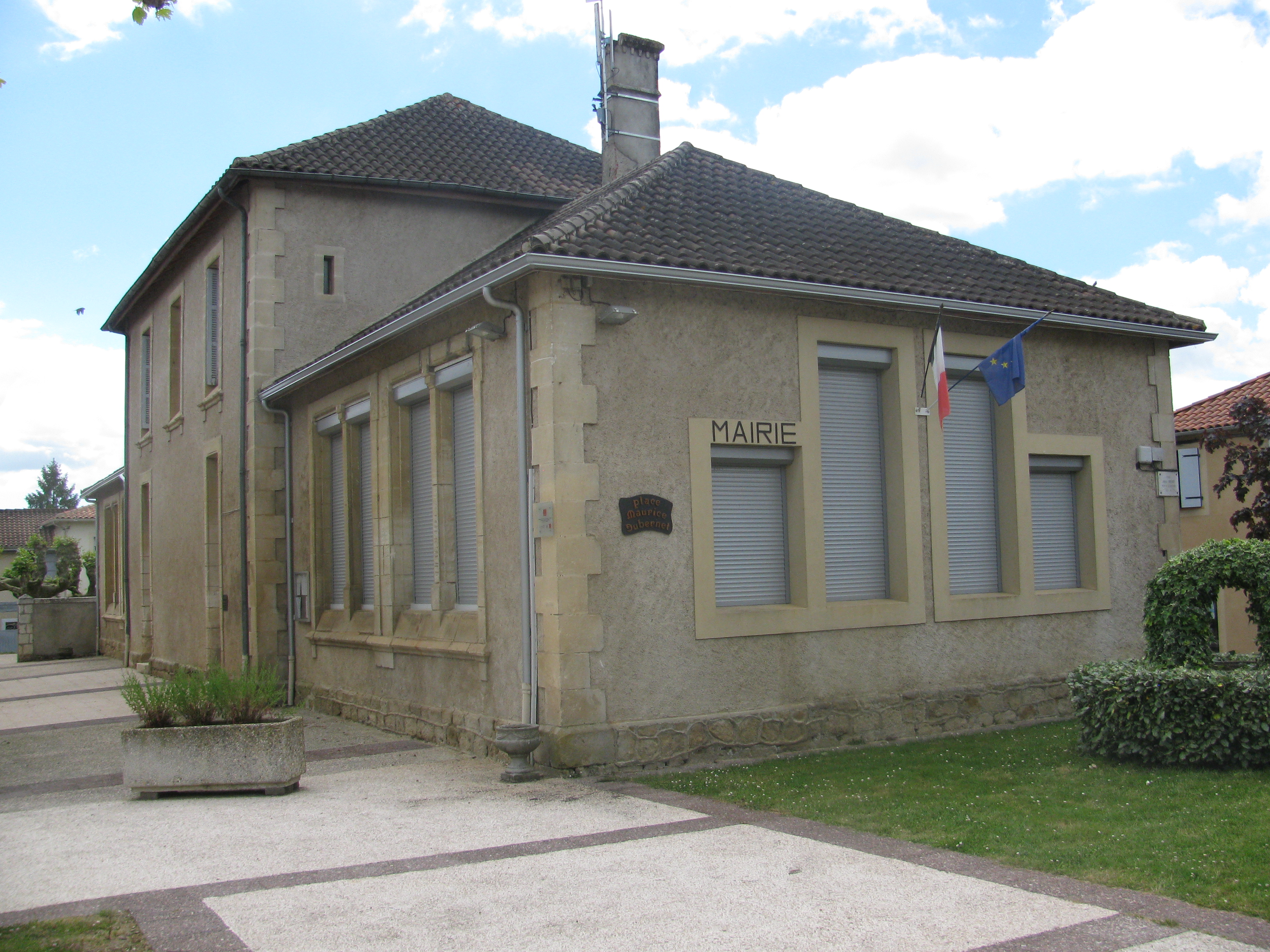 Mairie de Beaumarchés